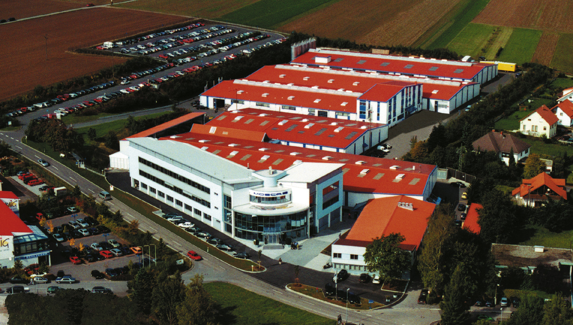 Hauptsitz der MOSCA AG in Waldbrunn (Odenwald)